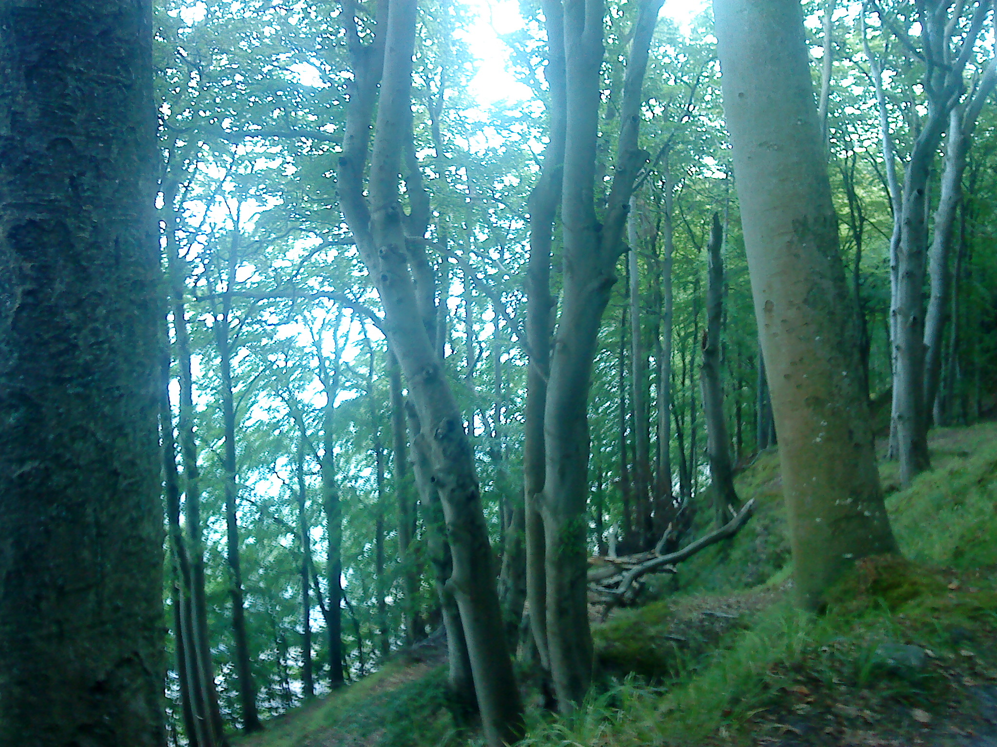 Granitz, bei der Teufelsschlucht